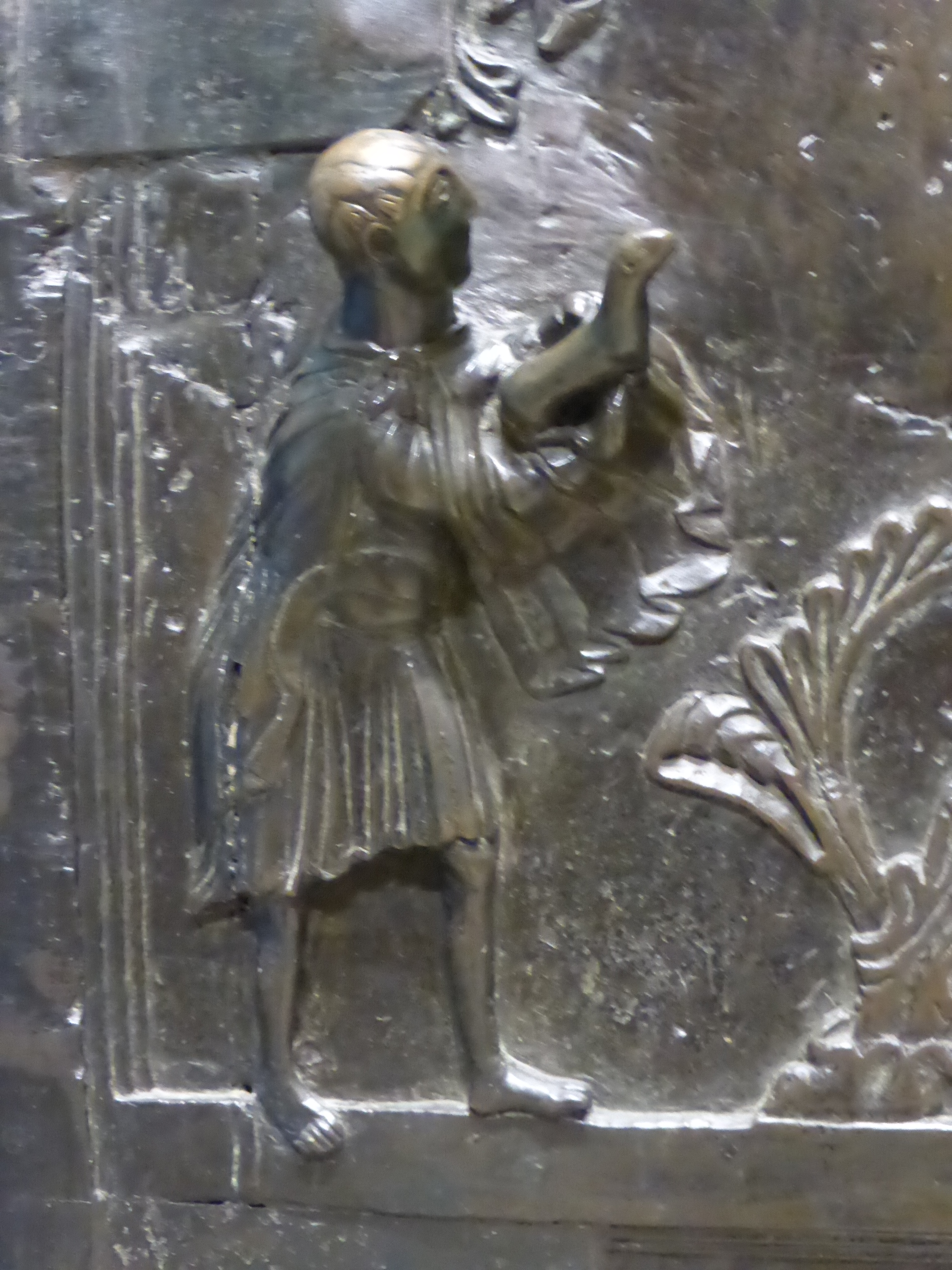 Abels Opfer, Bernwardstür im Hildesheimer Dom